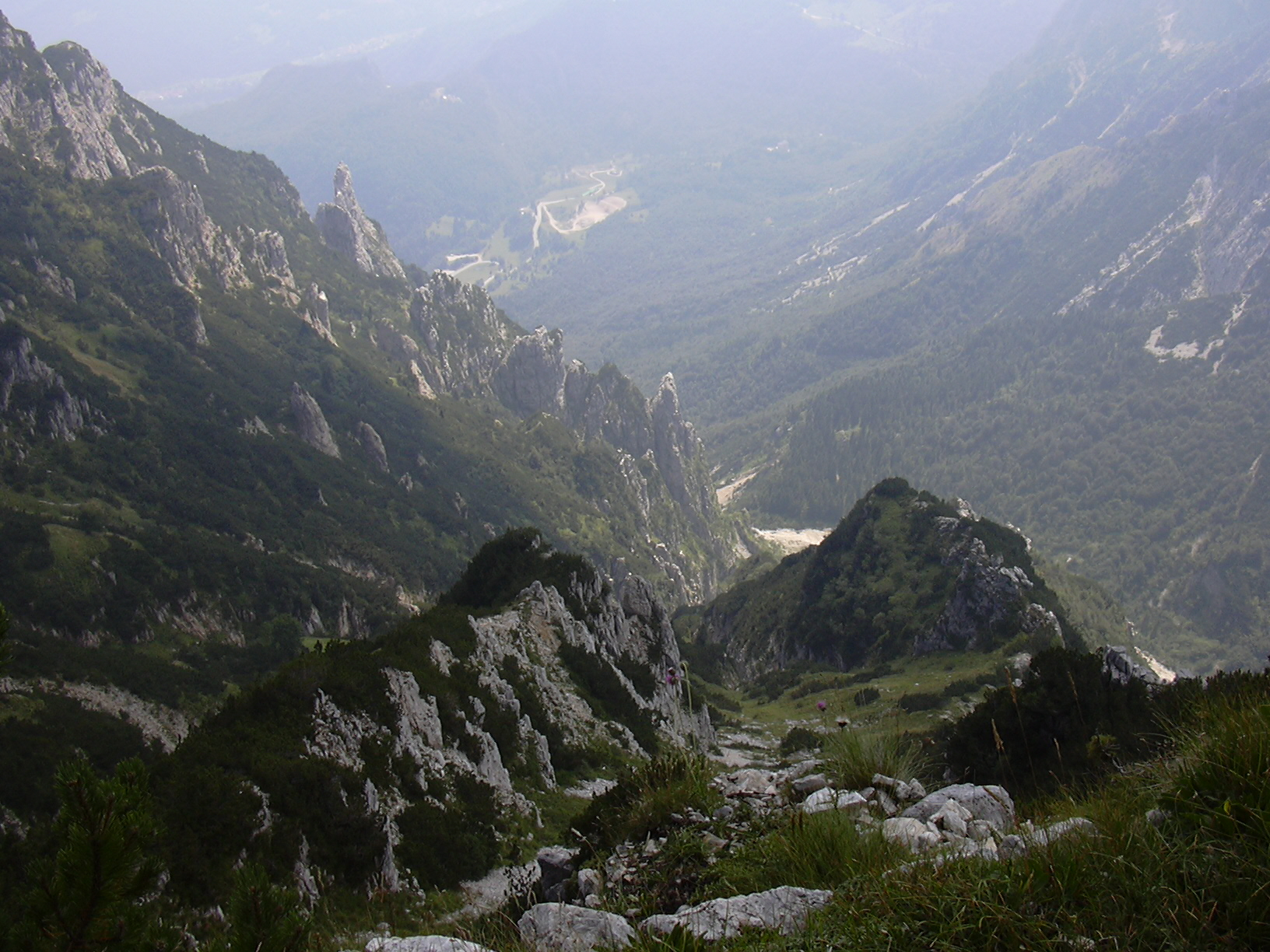 Vista panoramica dal monte Pasubio. Foto scattata da Nick1915